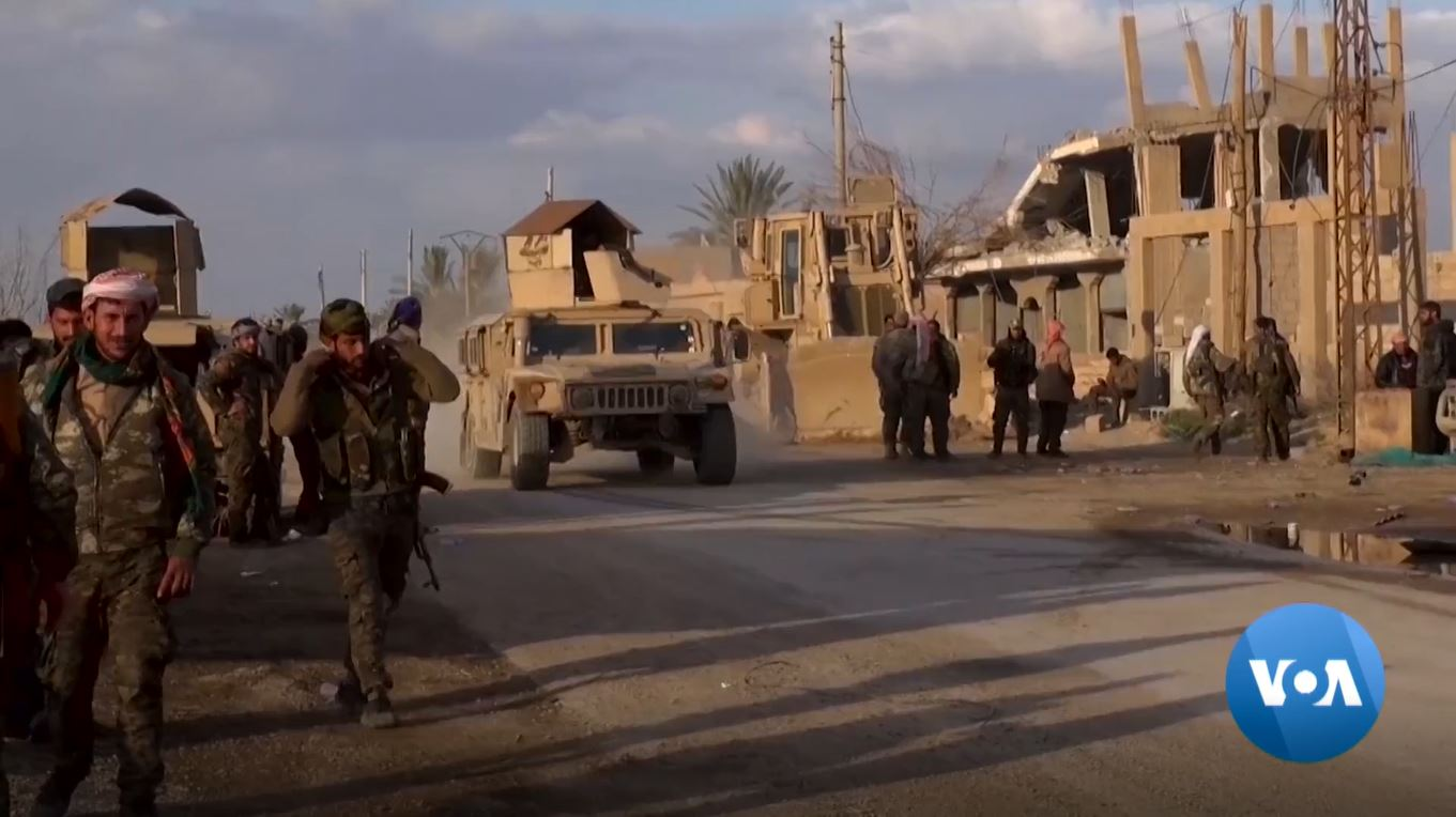 Bataille de Baghouz entre les Forces démocratiques syriennes et l'État islamique, le 12 février 2019.